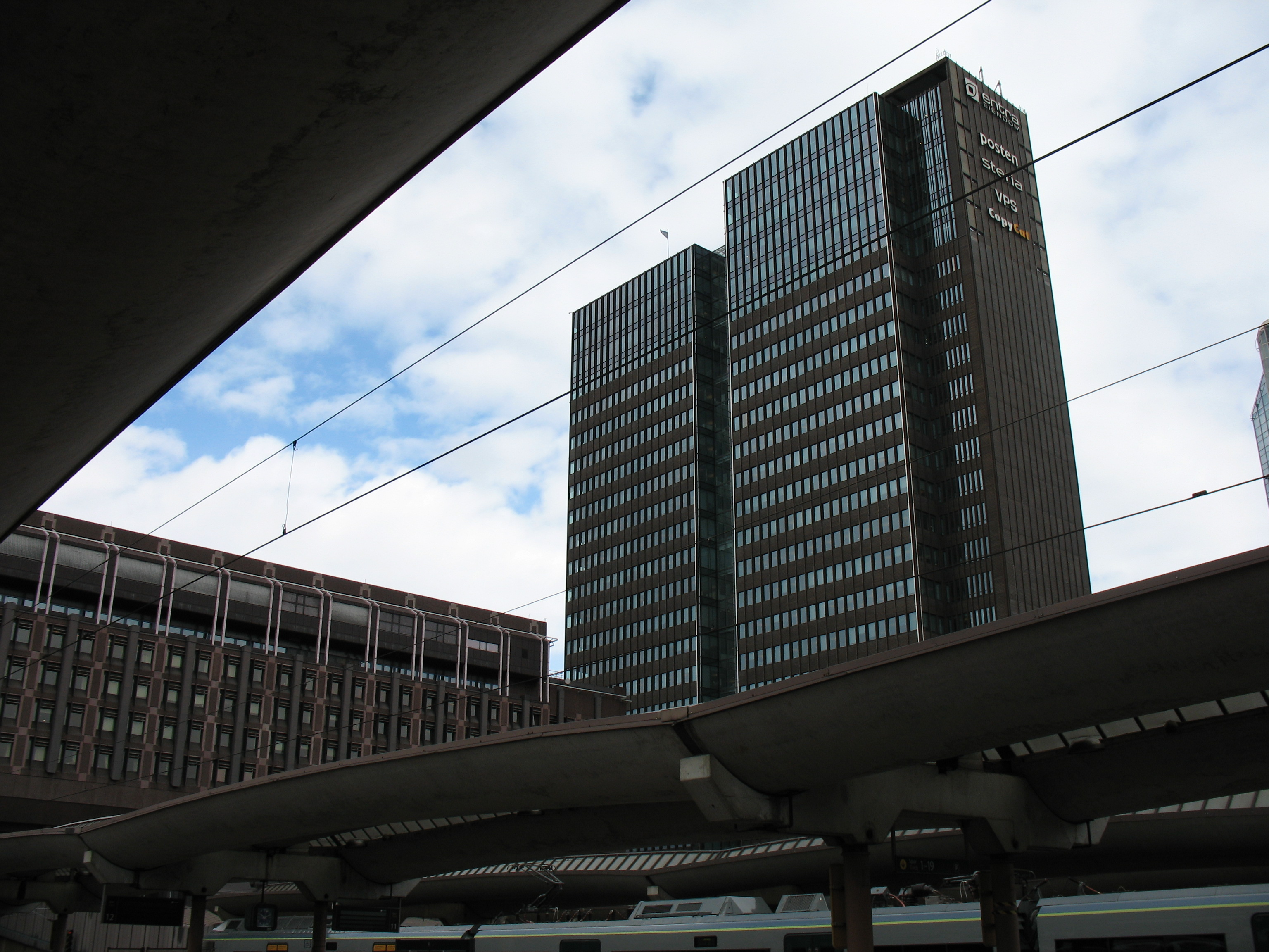 Postgirobygget. Oslo, Norway